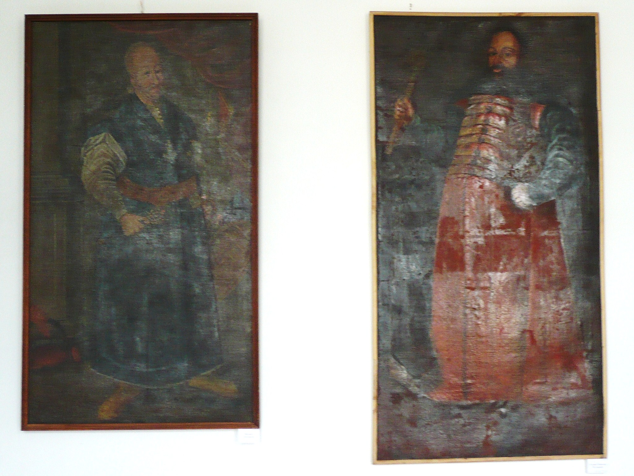 Wiśniowiec, obraz (left Mikołaj Bazyli Potocki)